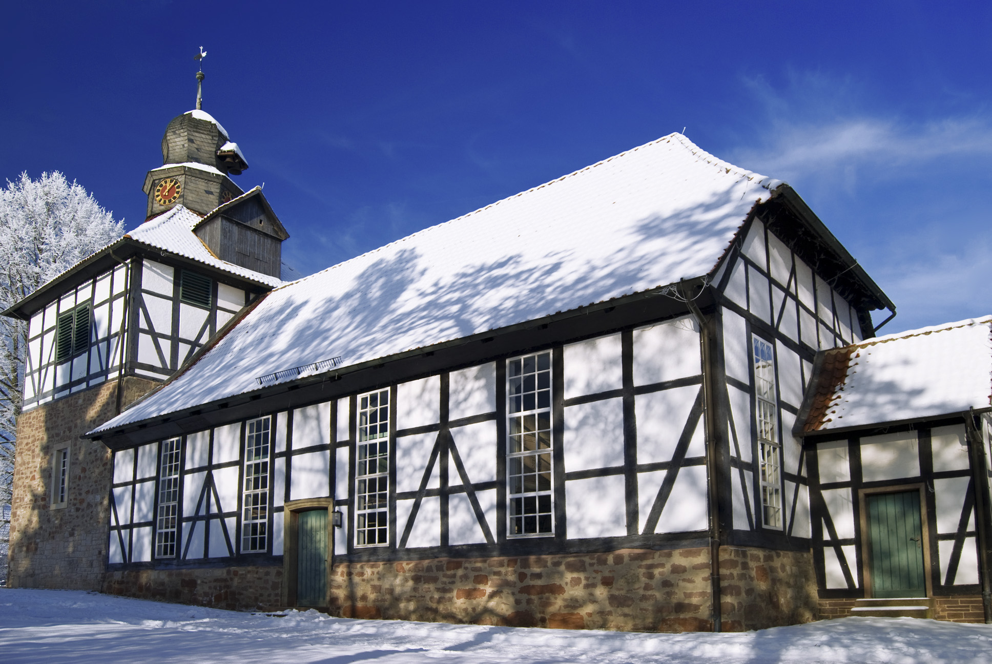 Die evangelische St.-Martini-Kirche zu Berka